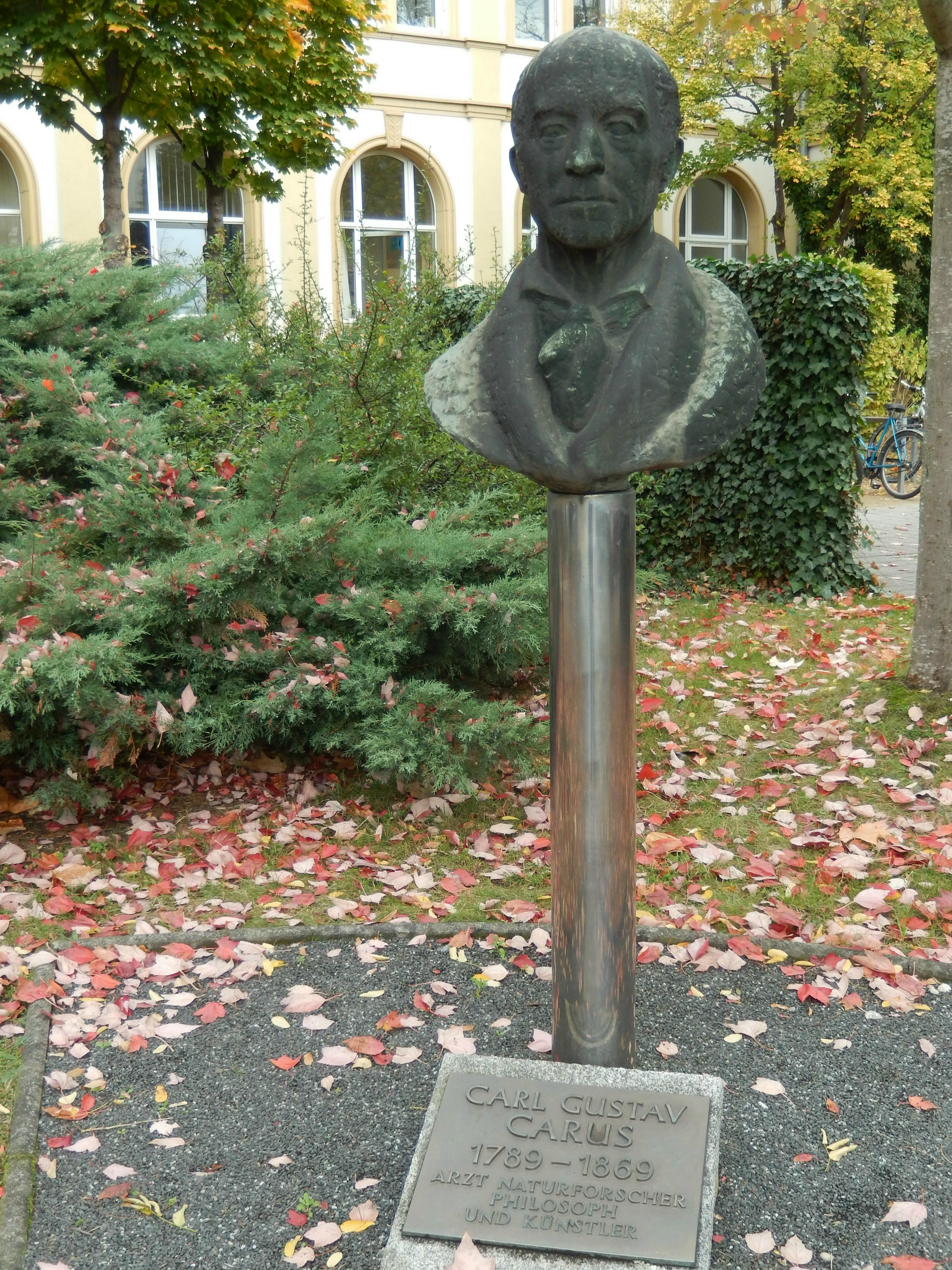 Dresden Fiedlerstrße: Denkmal Carus, Carl Gustav